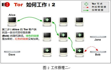 中文（香港）: Tor網絡如何運作